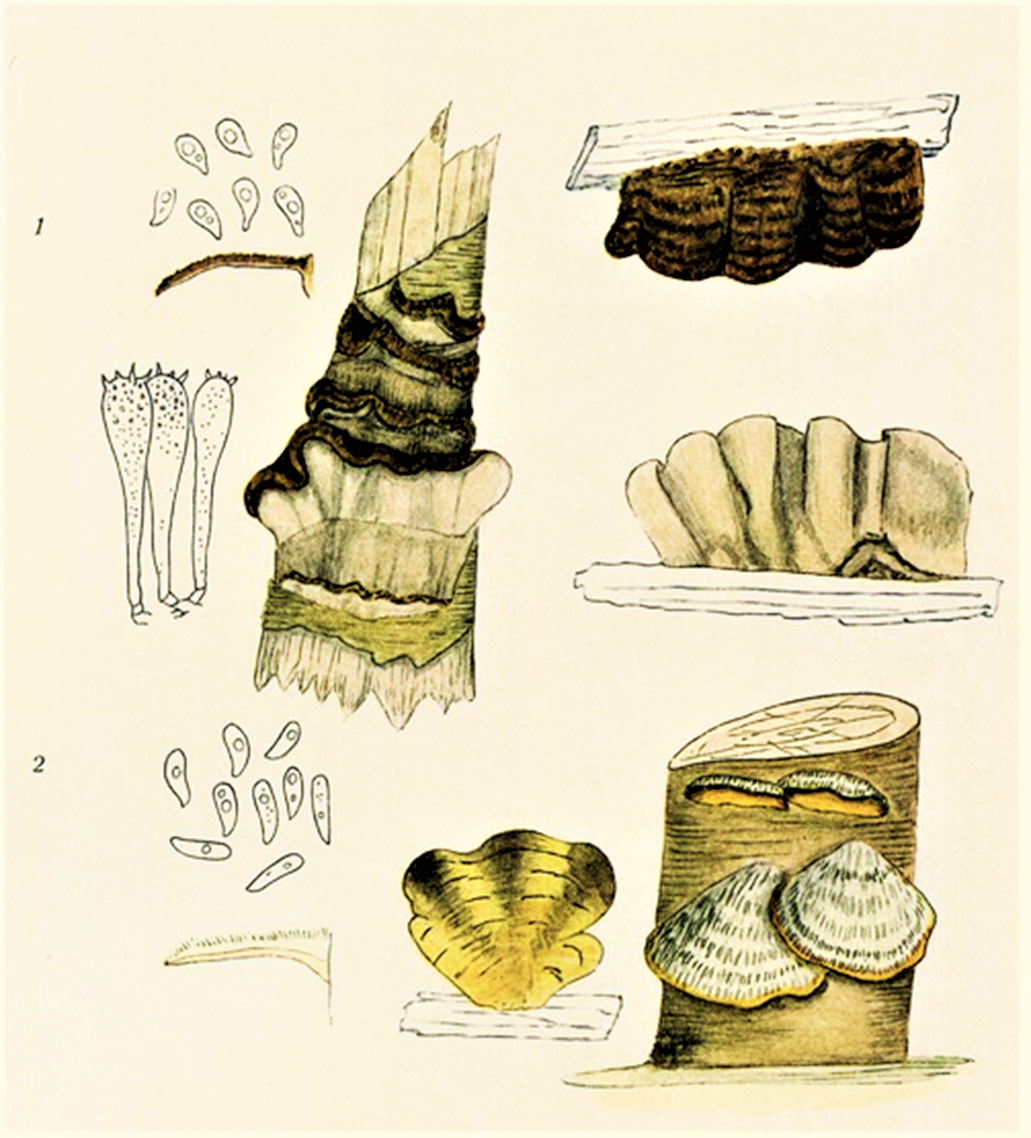 Bres.: 1. Stereum fuscum (Pers., 1801) P.Karst. (1883), heute Laxitextum bicolor (Pers., 1801) Lentz, 1956; 2. Stereum hirsutum (Willd., 1787) Pers., 1800